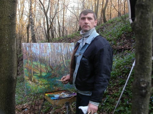 Художник Сергій Півторак